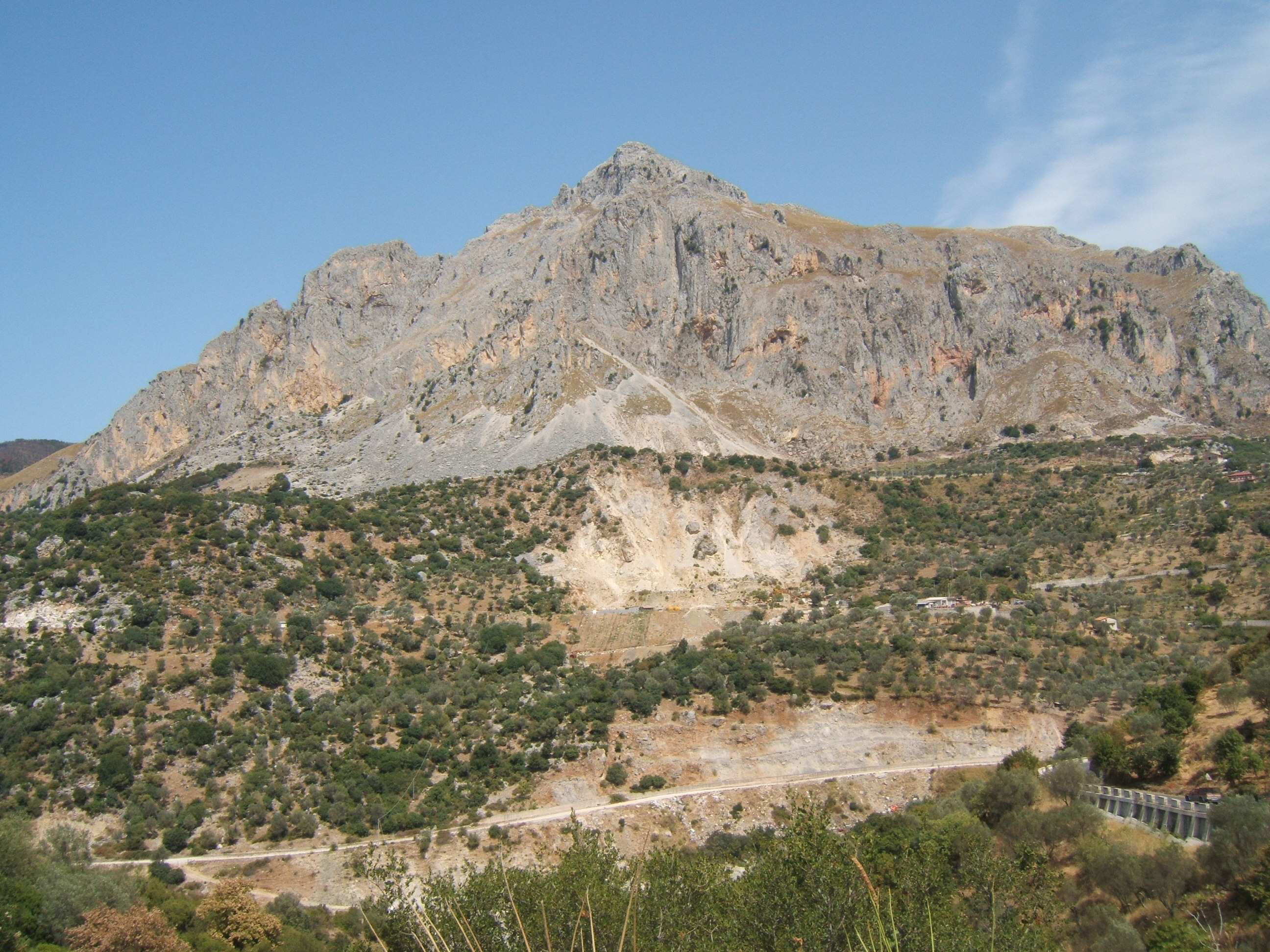 cava sul versante del fiume Rosmarino in Sicilia